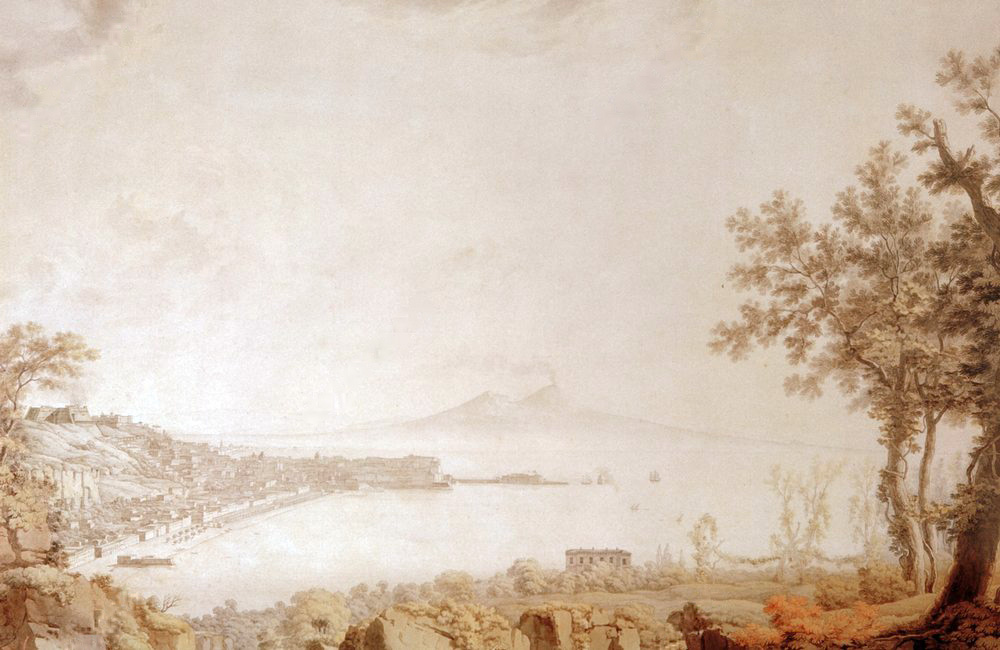 Christoph Heinrich Kniep, Die Bucht von Neapel mit Blick auf den Vesuv - Aquarell über Federzeichnung.